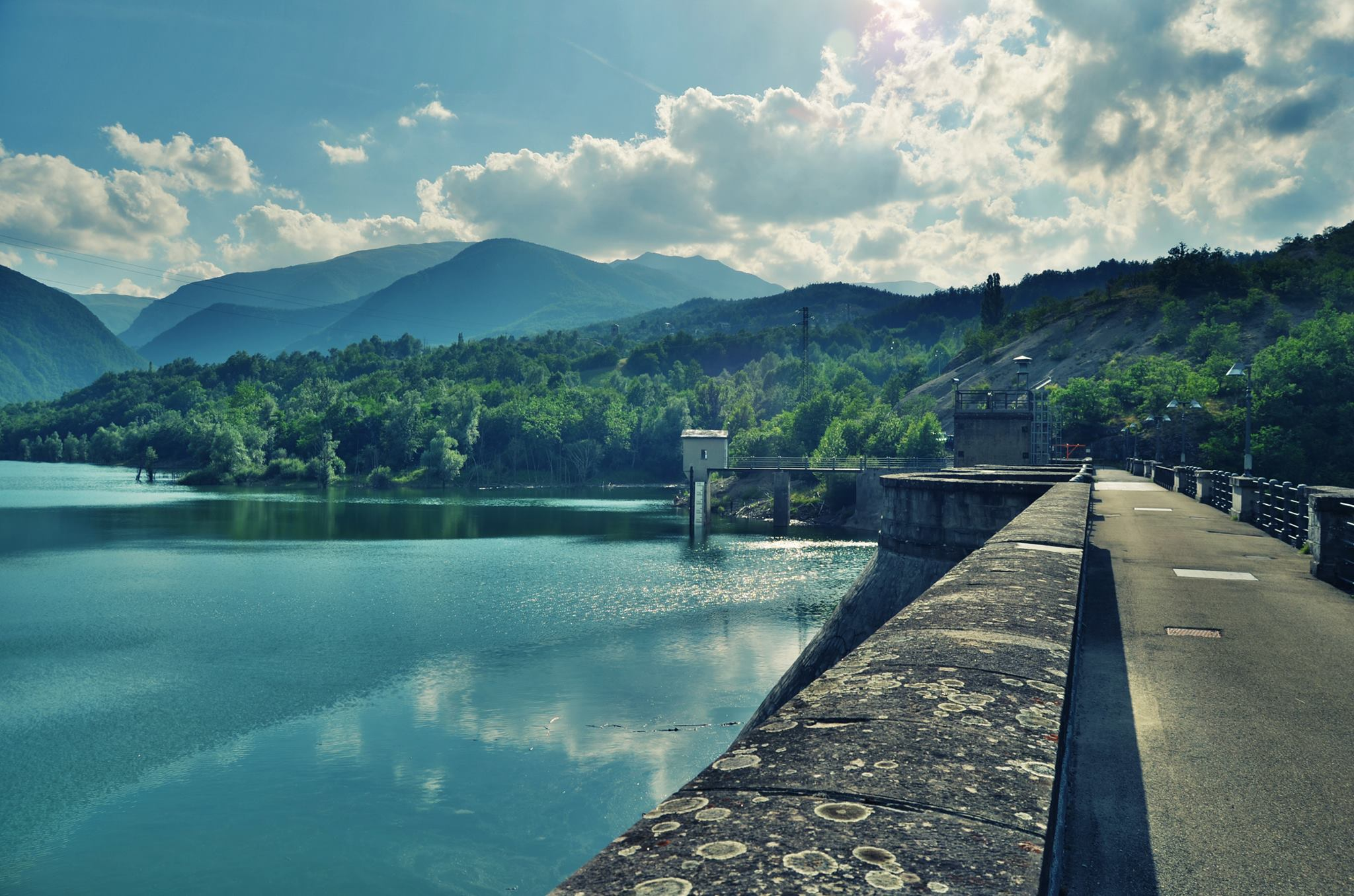 Diga di Fontanaluccia. Foto effettuata dallo sbarramento. in direzione lato nord-ovest